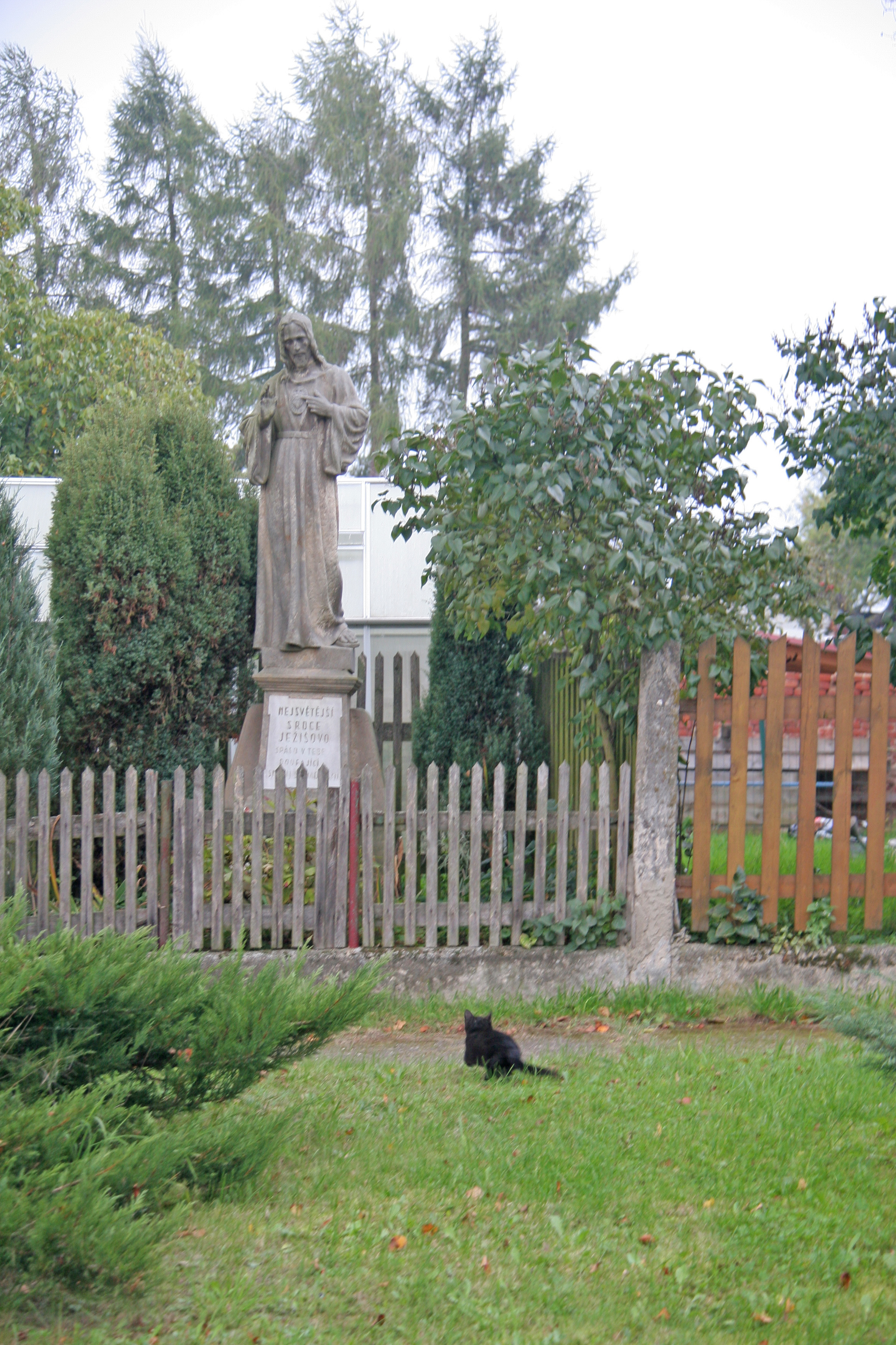 Hoděšovice socha Nejsvětějšího srdce Ježíšova